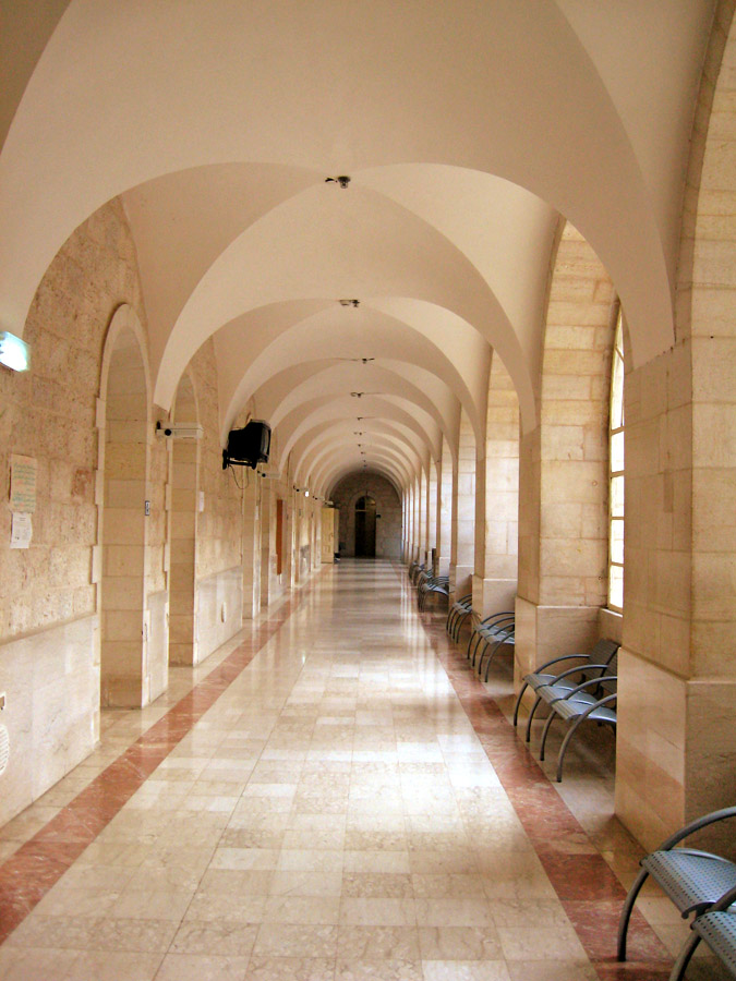 Corridor in Augusta Victoria in Jerusalem